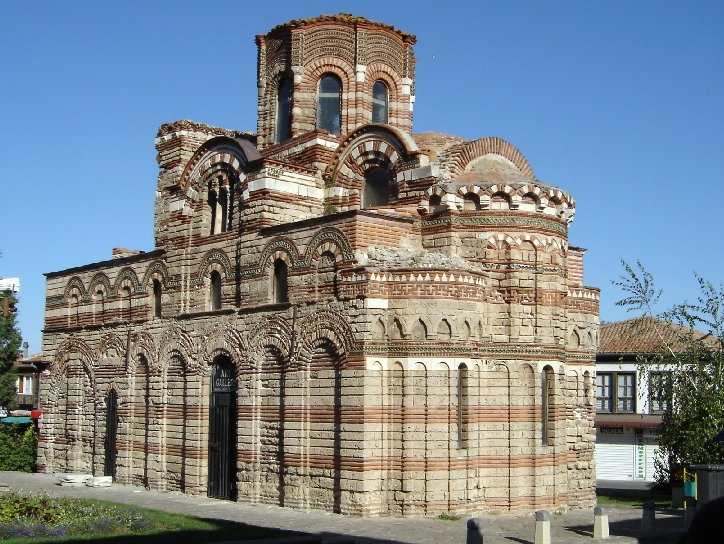 Church of Christ Pantocrator, Несебър, България